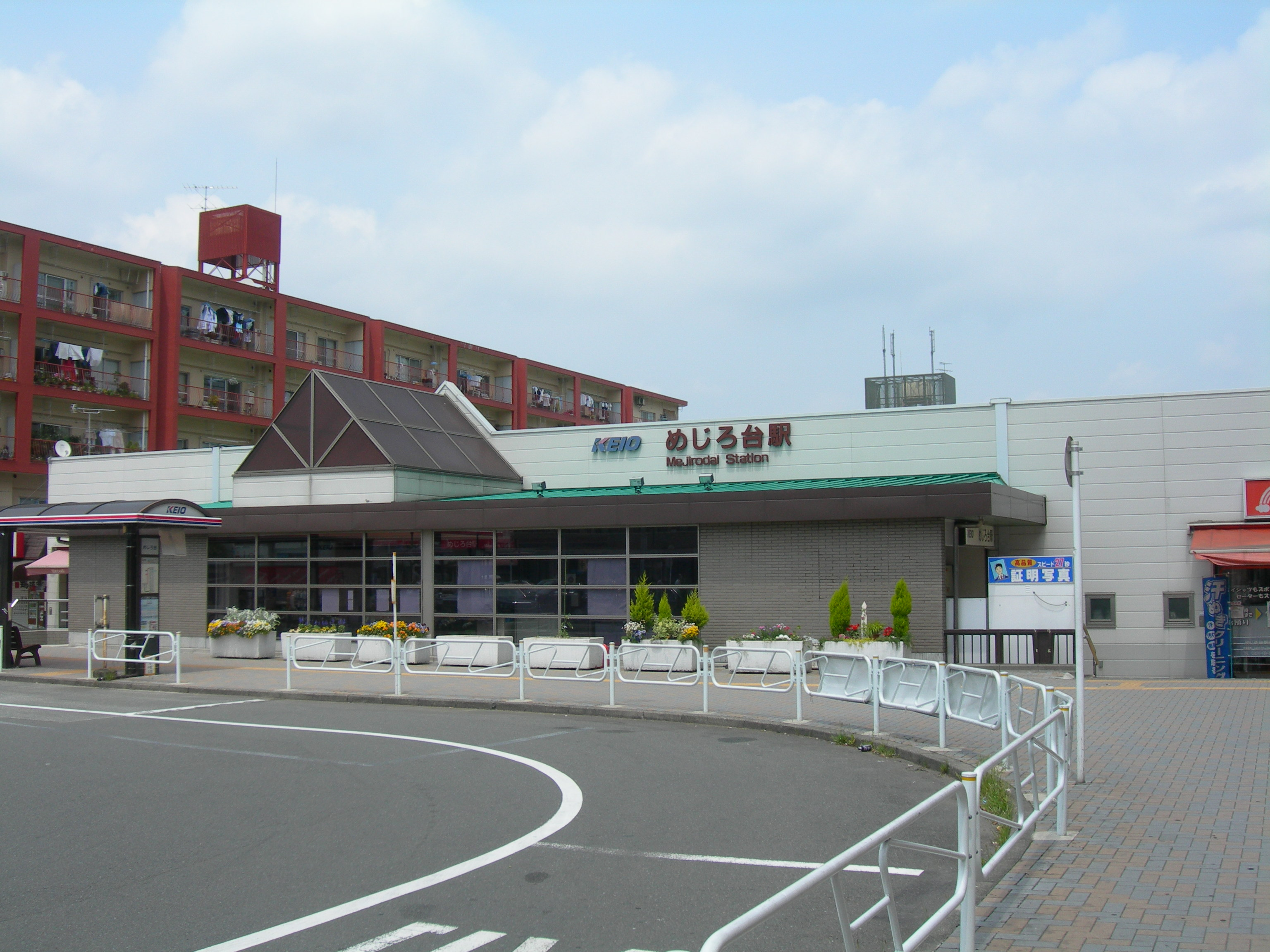 めじろ台駅